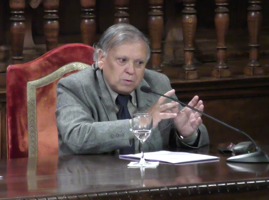 Historiador Chileno